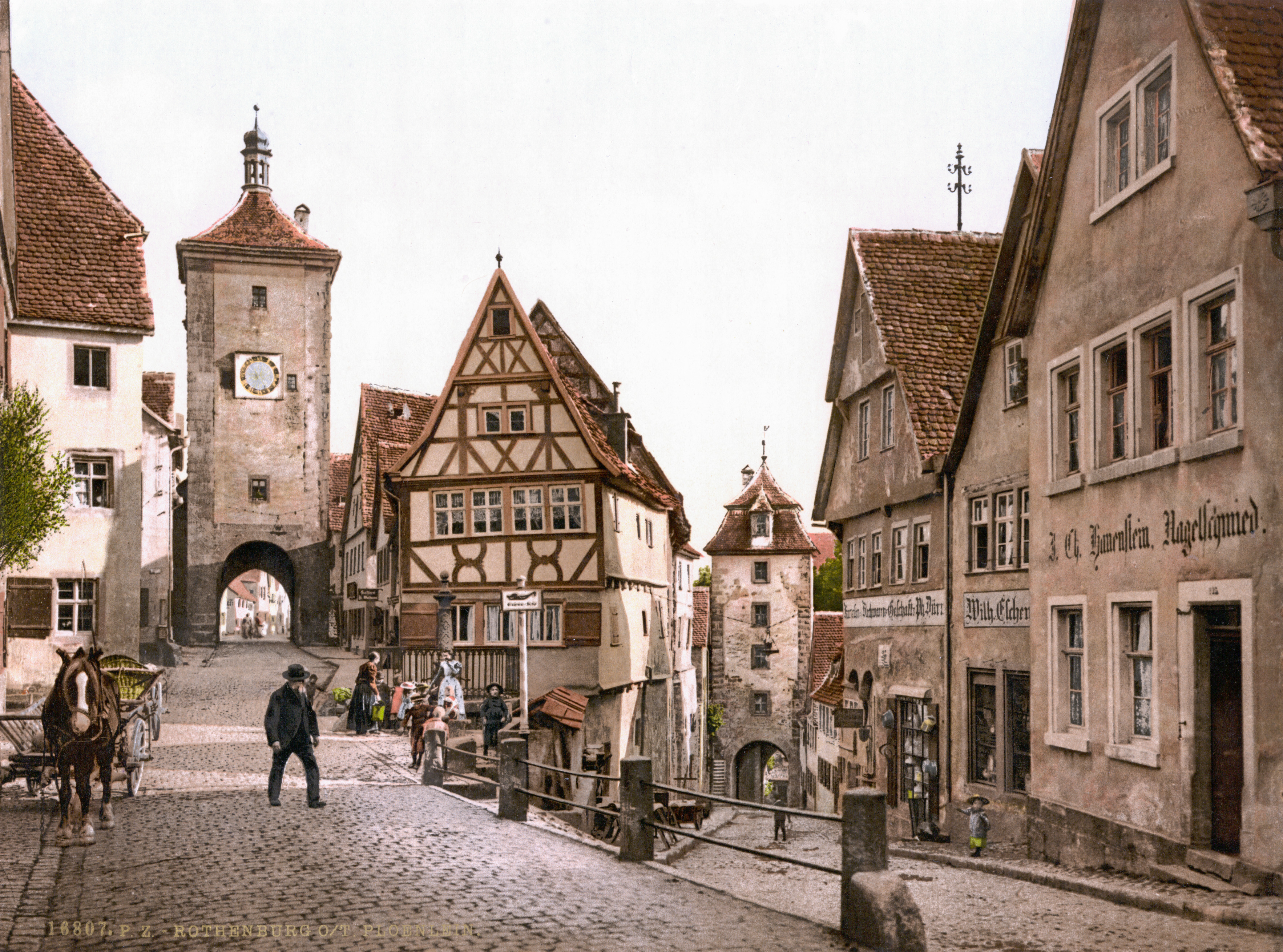 Plönlein Rothenburg um 1900